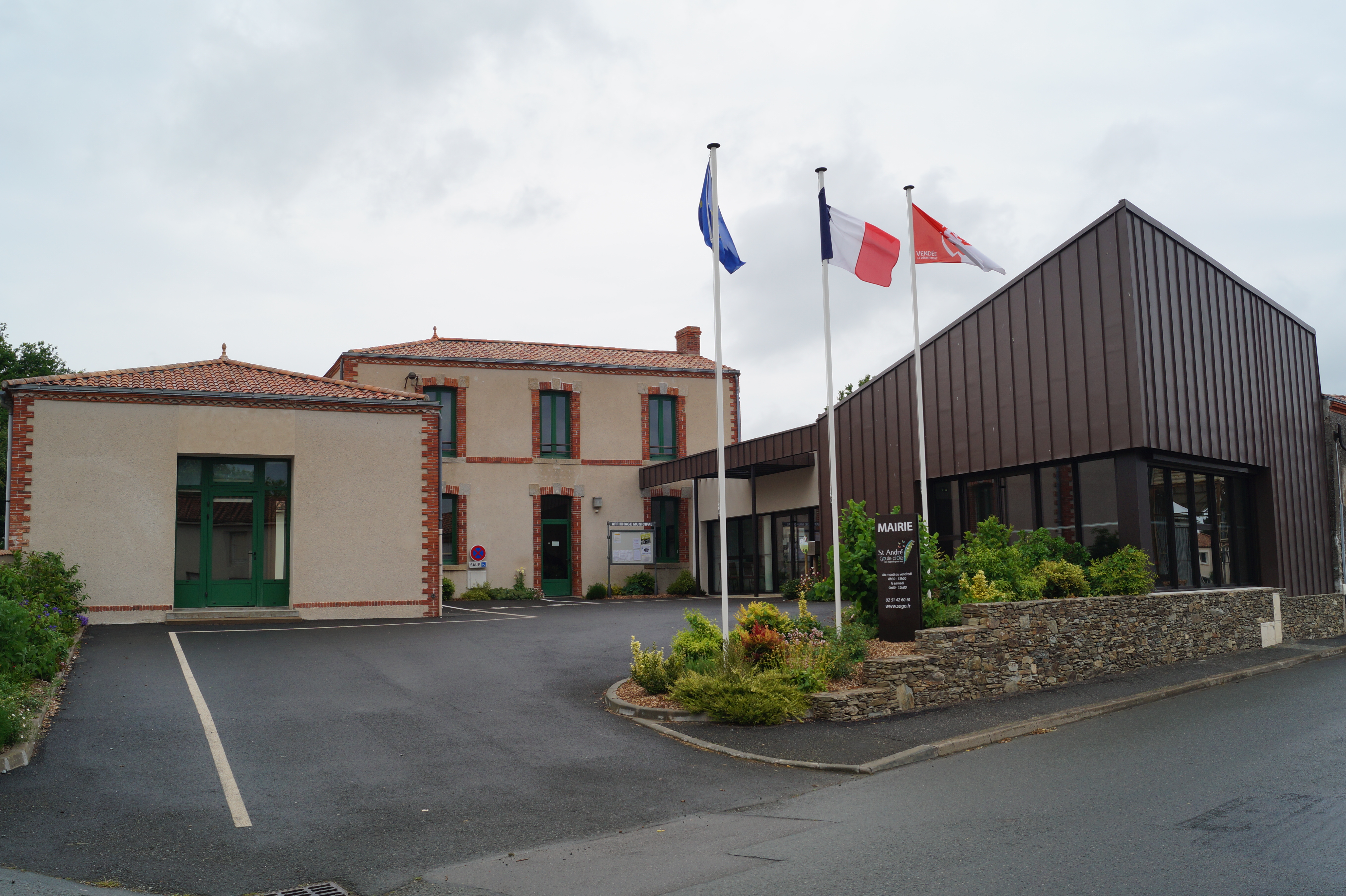 La mairie de Saint-André-Goule-d’Oie.